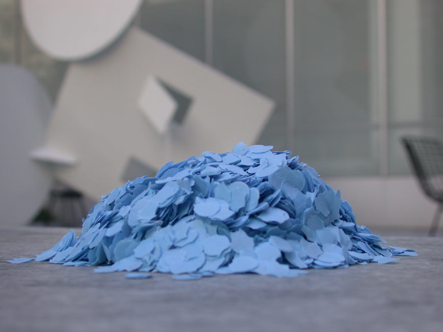 Documentation photographique d'une installation lors d'un evenement artistique dans les jardins du Moma à NYC en octobre 2008